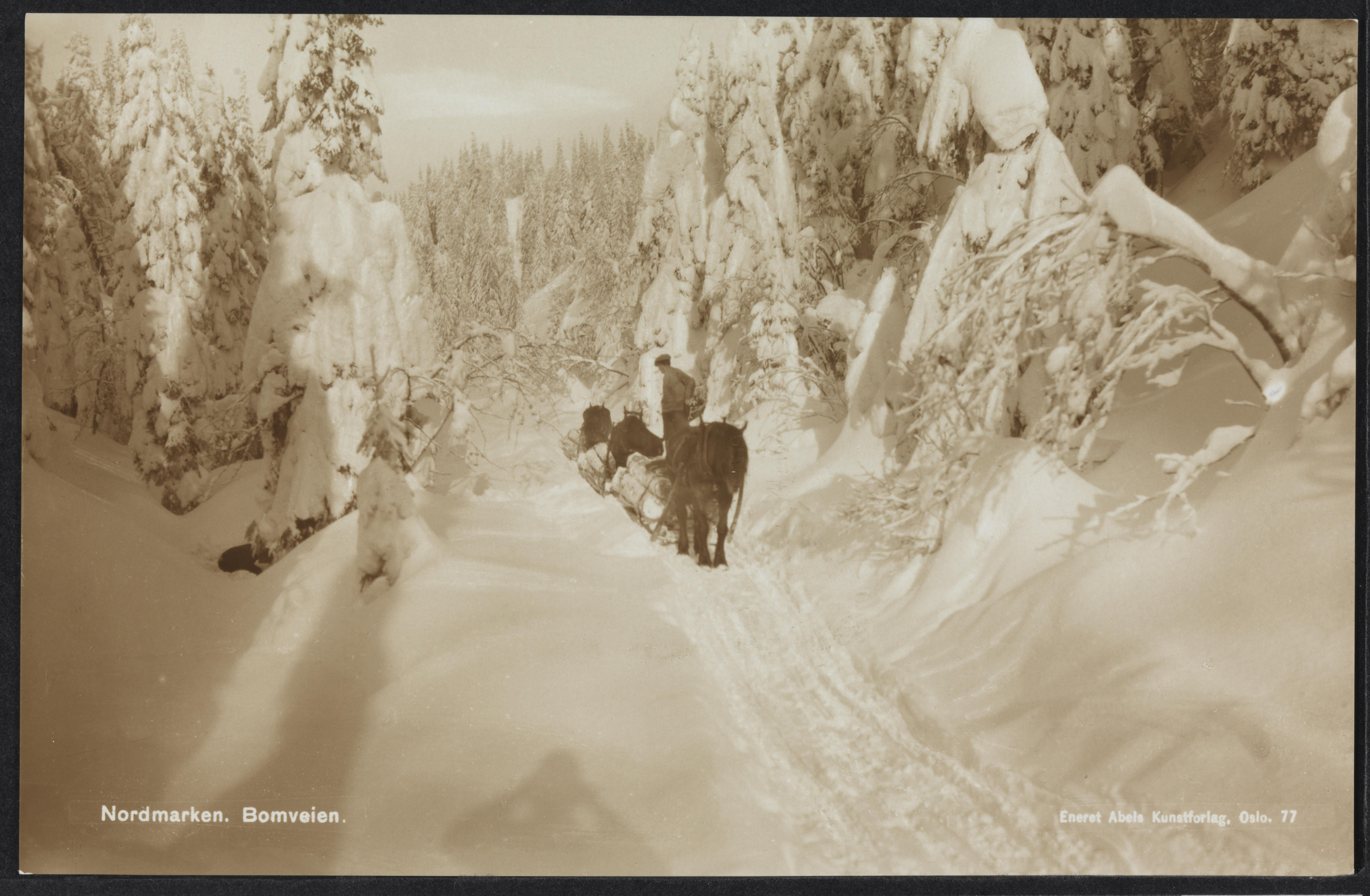 Bildet er hentet fra Nasjonalbibliotekets bildesamling Nordmarka, Oslo, Oslo